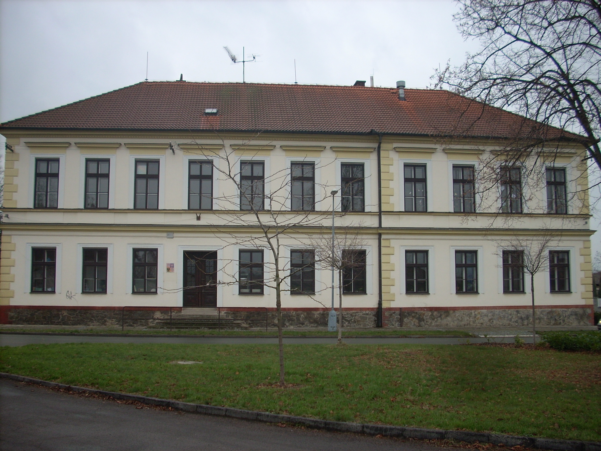 Dvojjazyčná základní škola, postavena 1887; Rosice